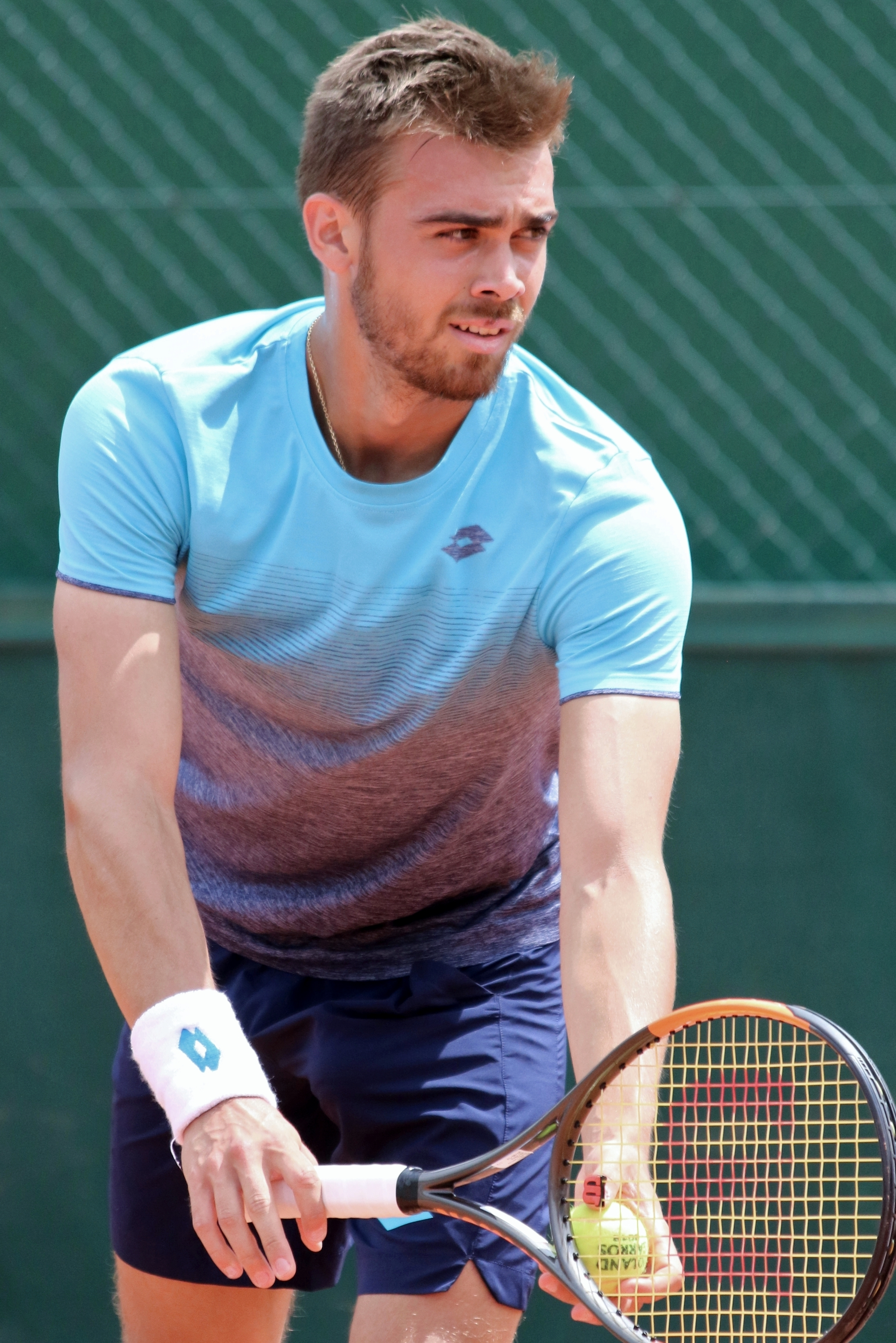 Bonzi RG18 (7)